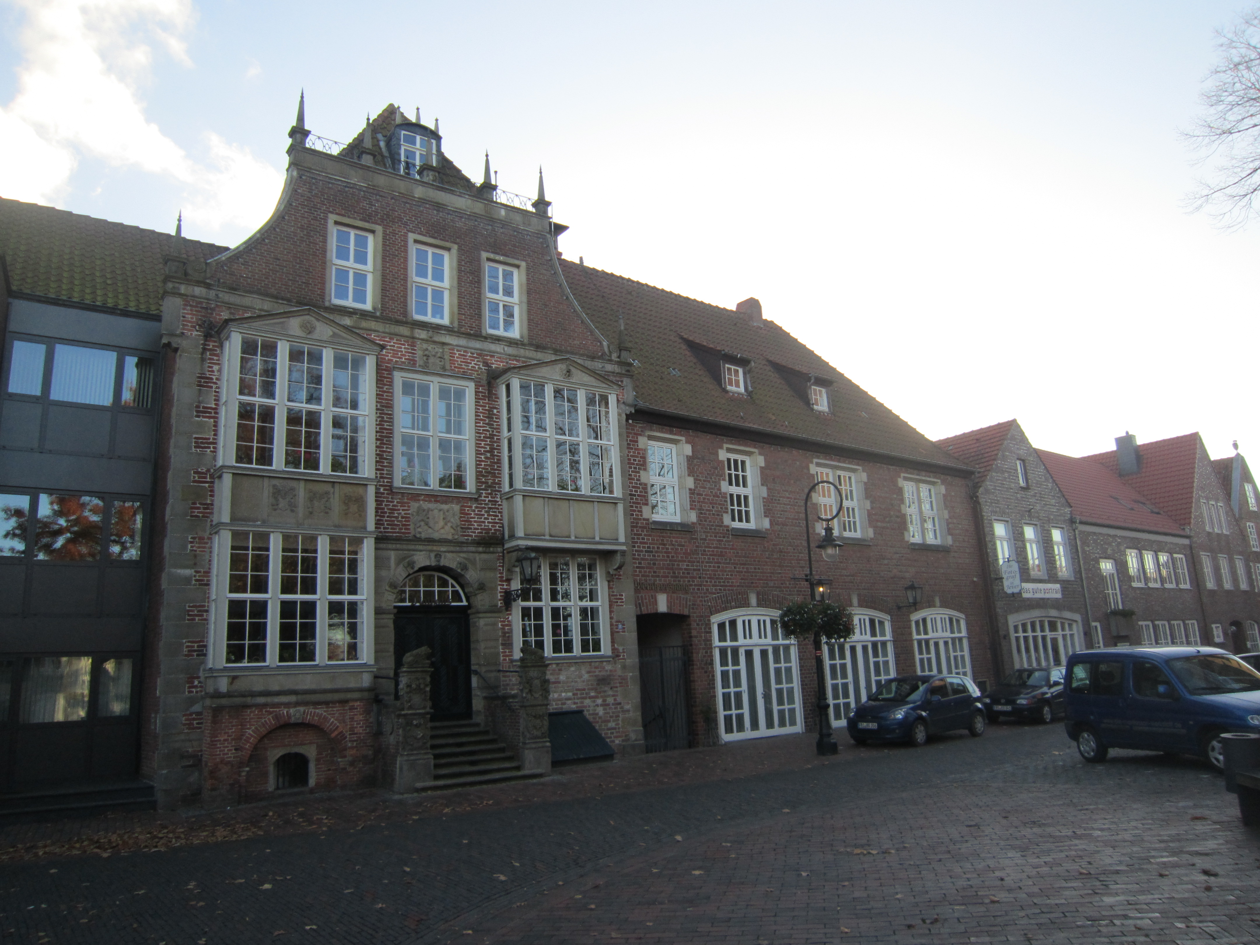 Jever